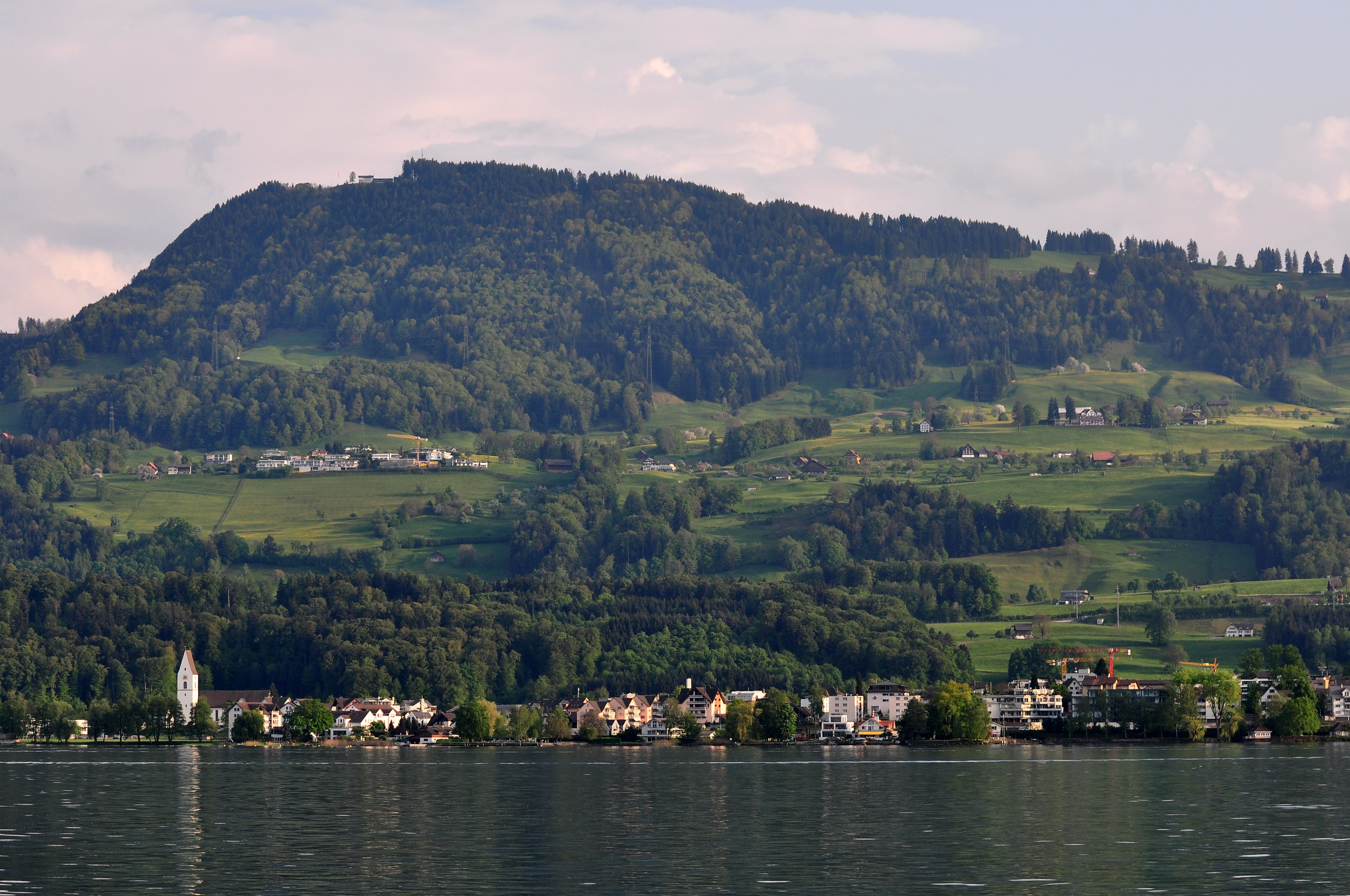 Etzel mountain and Freienbach in as seen from Zürichsee-Schifffahrtsgesellschaft (ZSG) motorship MS Limmat on Zürichsee